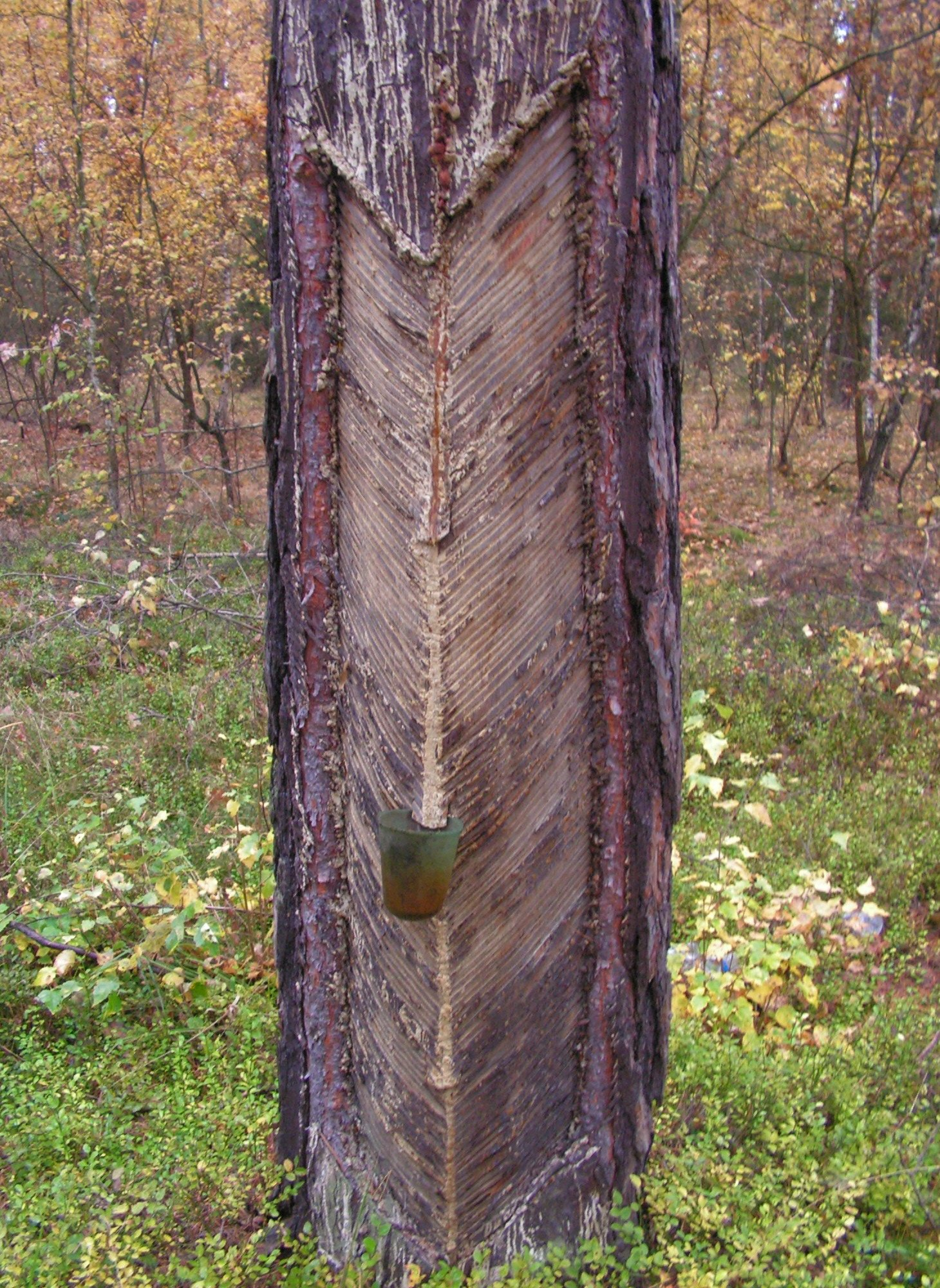 Żywicowanie